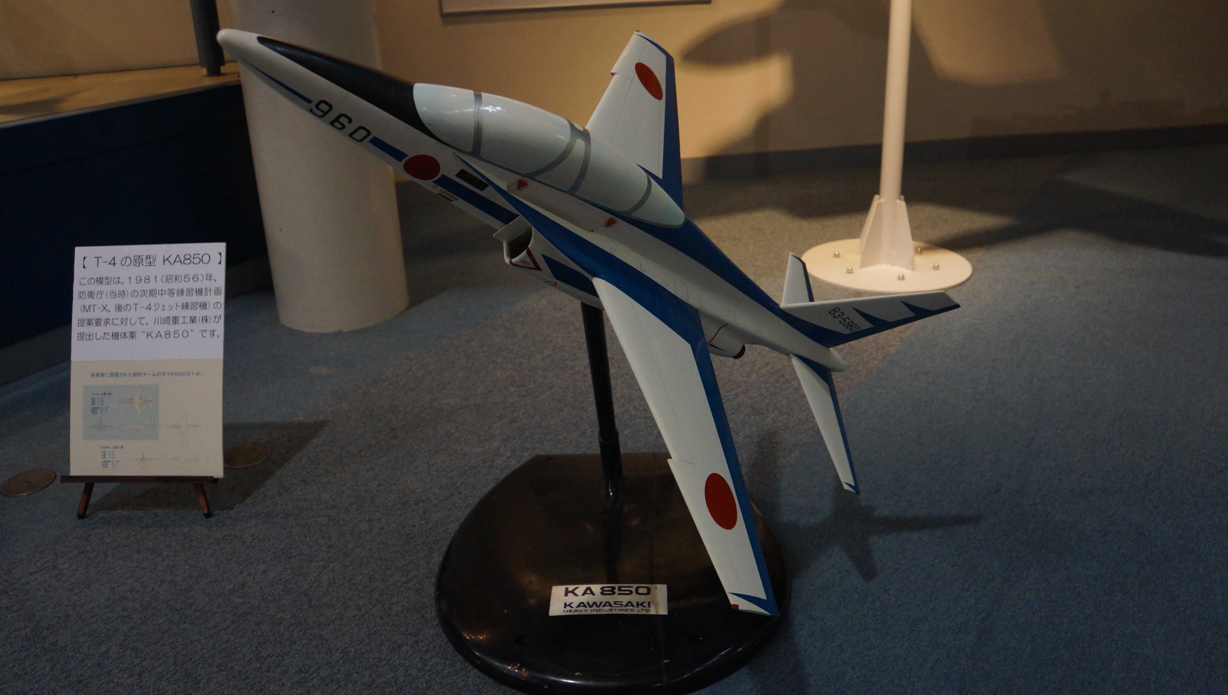 次期中等練習機計画MT-X（後のT-4練習機）における川崎重工業の機体案 KA850の模型。2014年11月2日 かかみがはら航空宇宙科学博物館内にて。